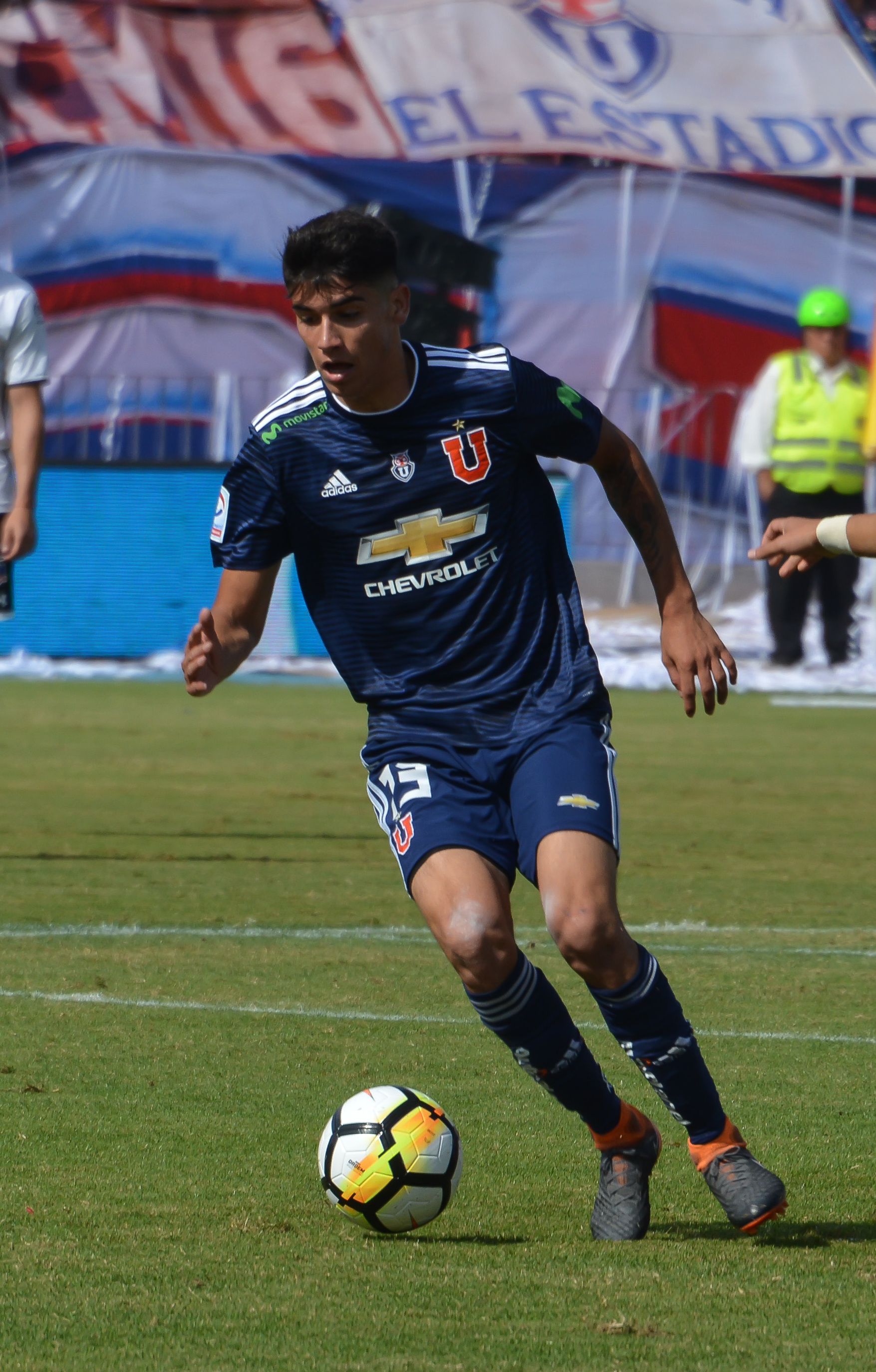 Universidad de Chile v Colo-Colo, Estadio Nacional, Santiago, Chile.